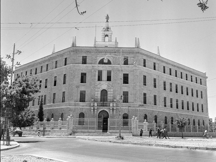 בניין טרה סנטה בכיכר פריז. 1950